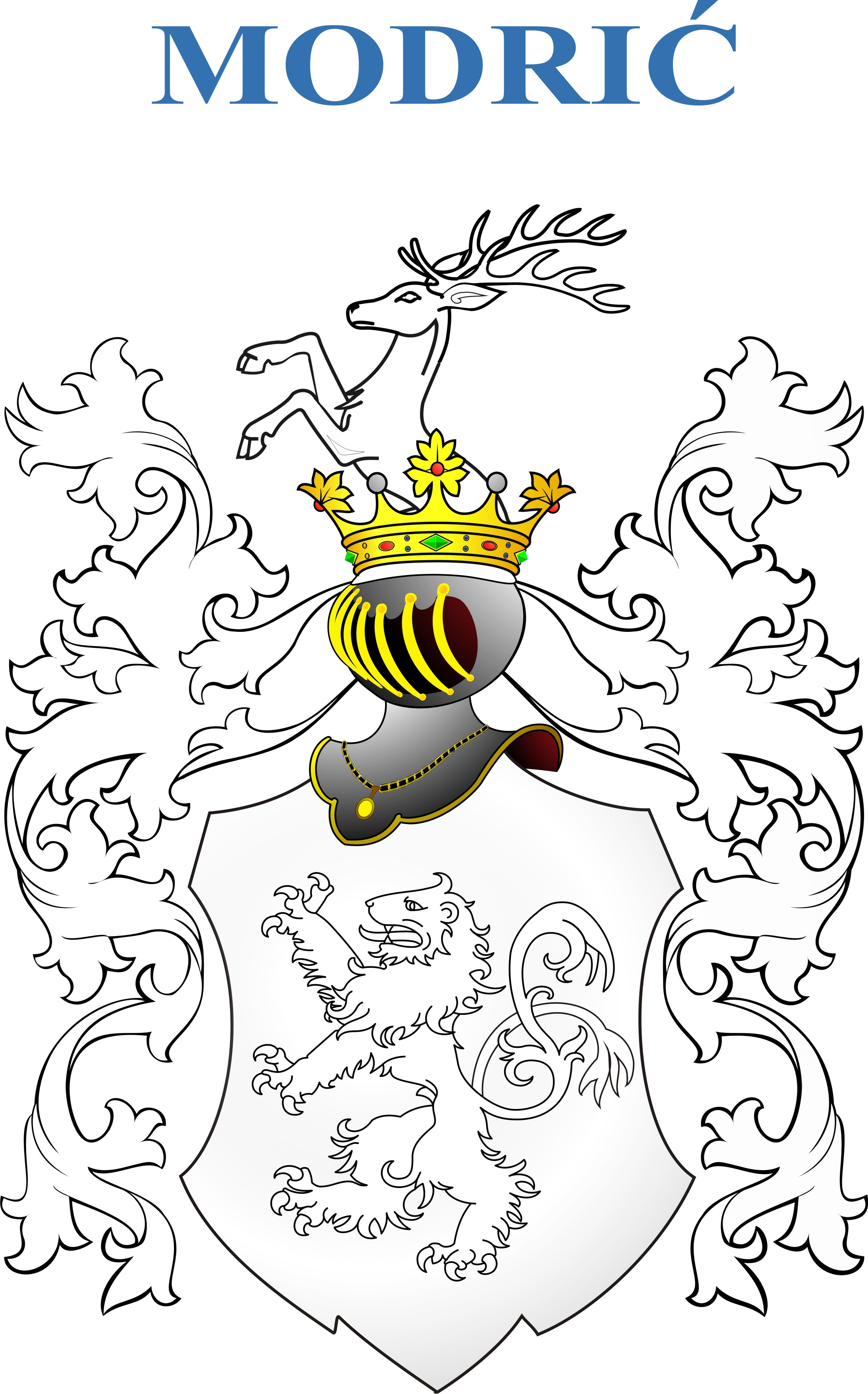 Grb Ivana Modrića iz 1673 na ossnovu voštanog pečata